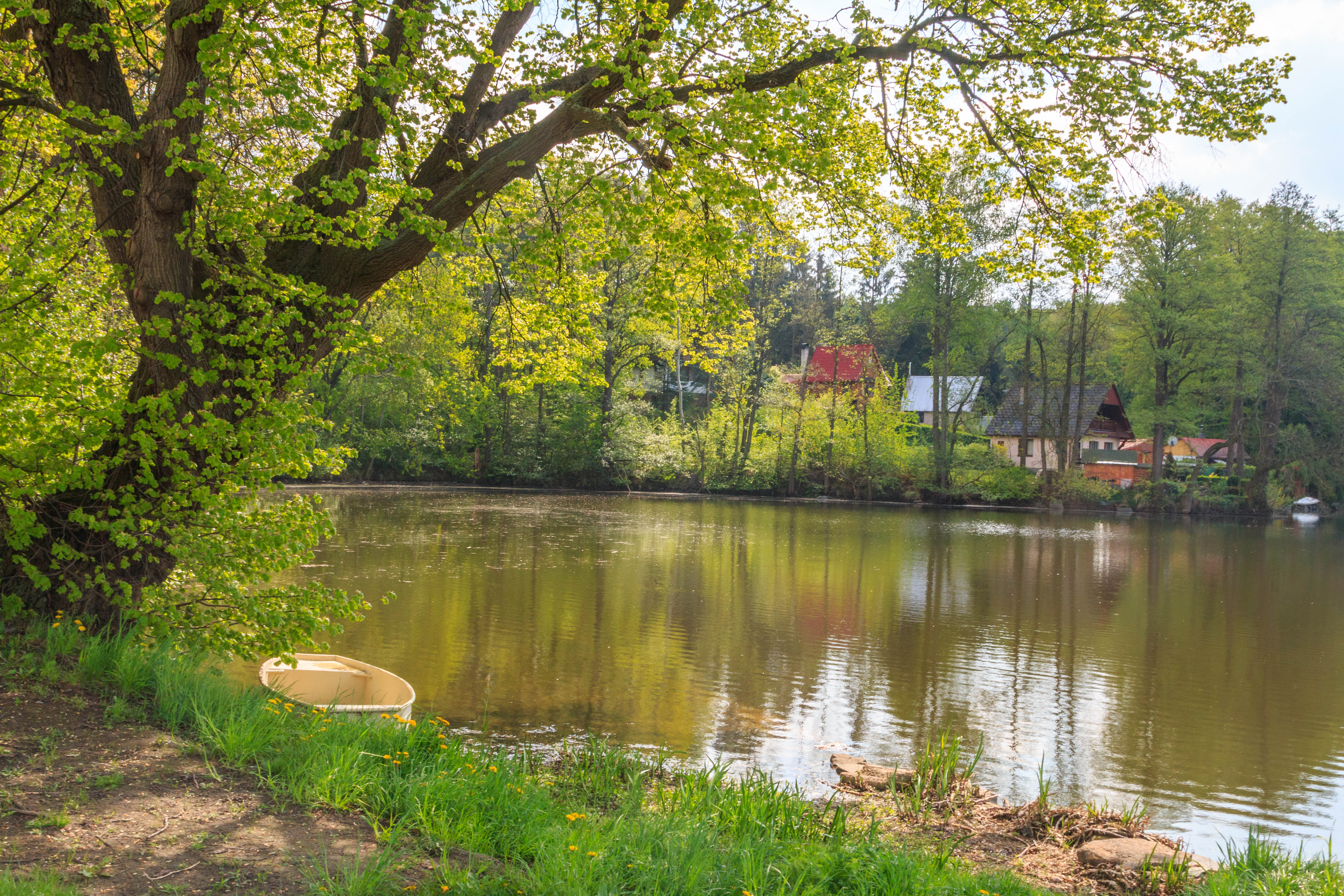 Rybník Pelíšky u Sovoluské Lhoty Project: Vodstvo.